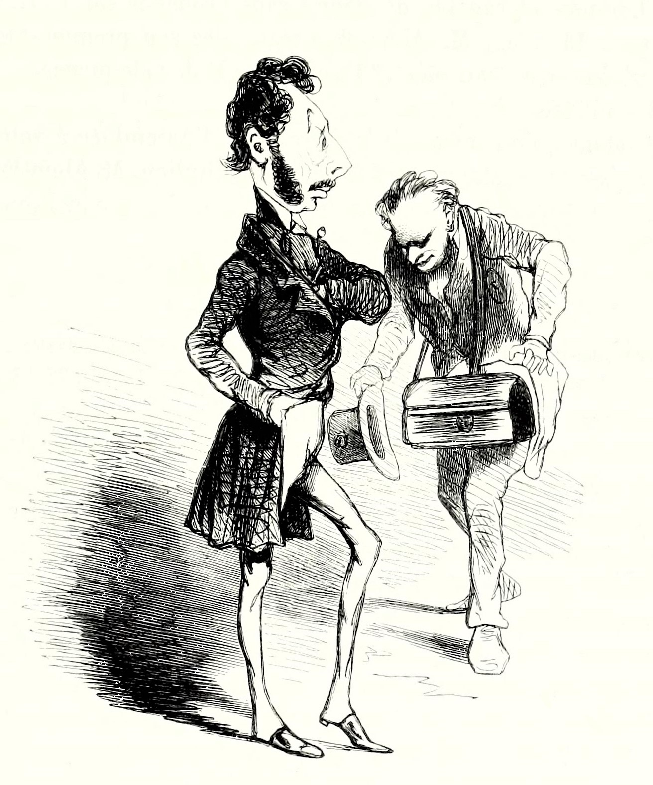 Caricature d'Etienne Arago, par Cham.